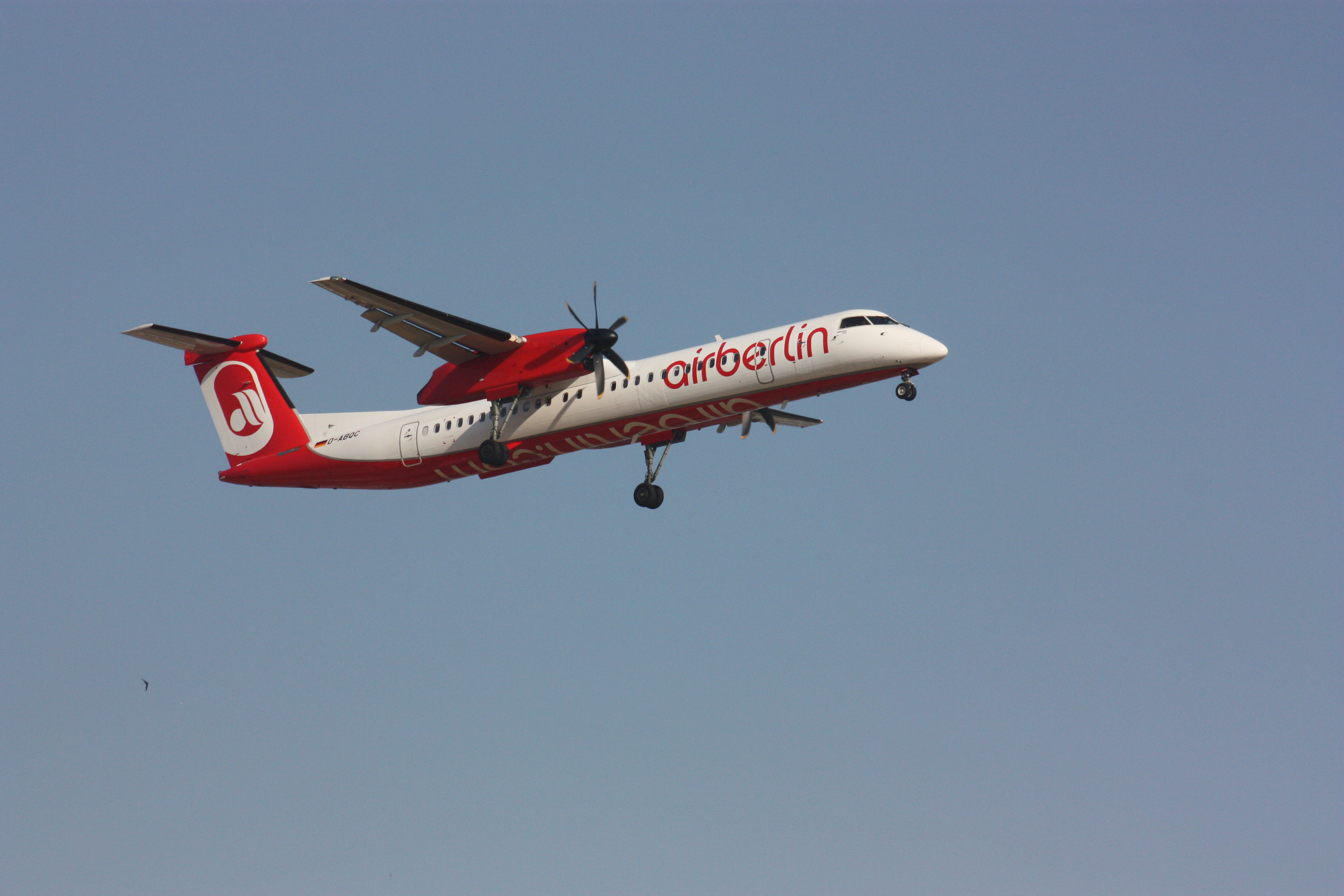 Q400 d'Air Berlin D-ABQC en approche finale piste 06 à Orly (LFPO).